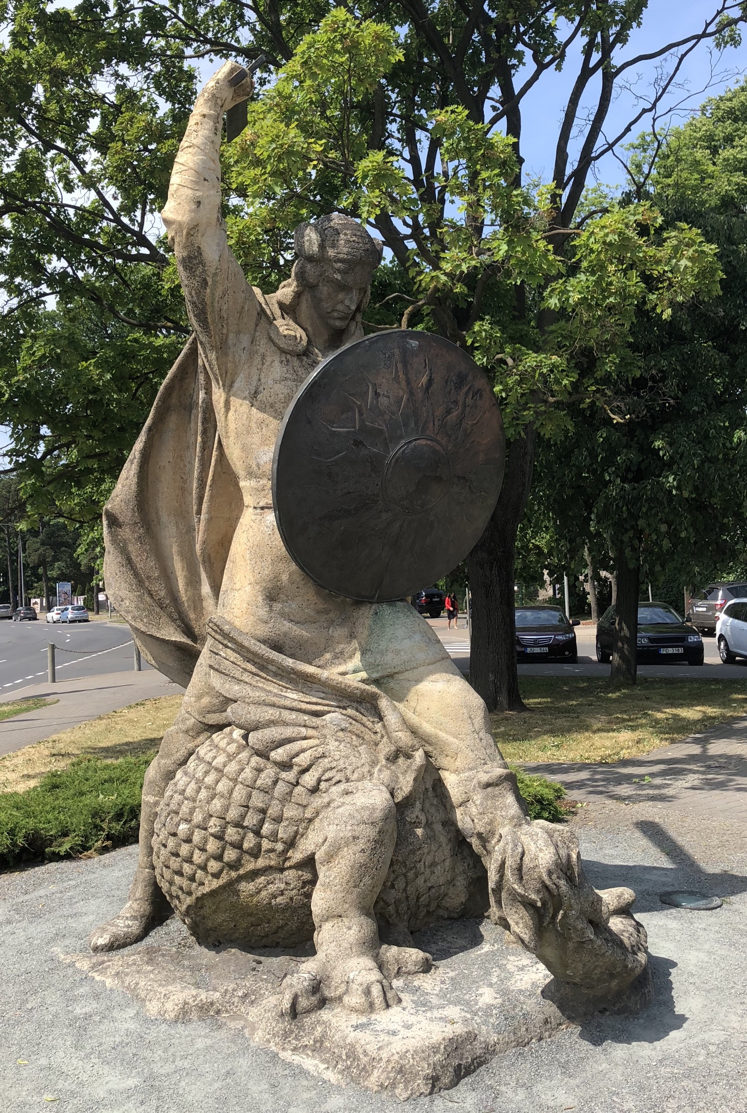 Skulptur in Riga-Strand